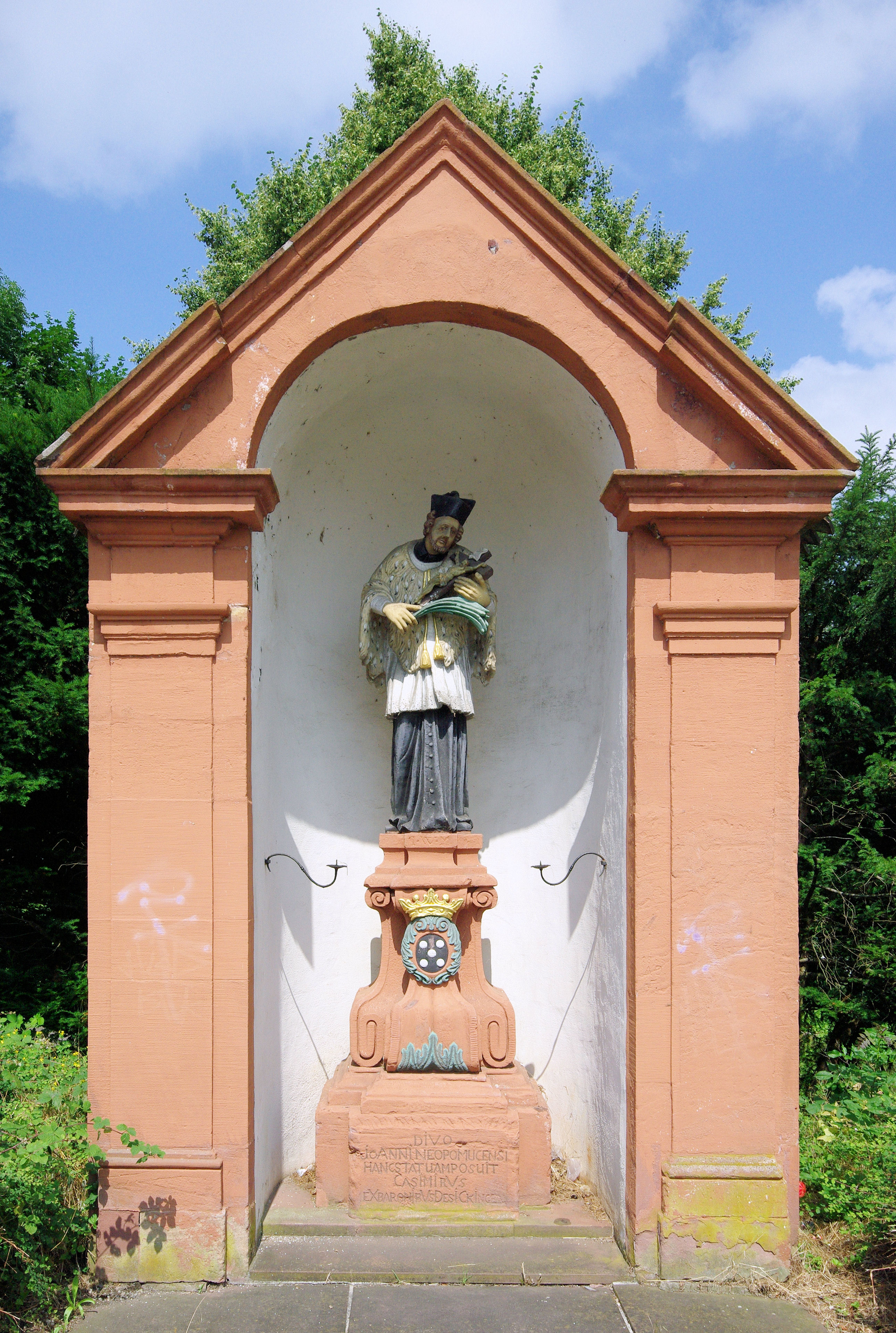 Die St. Nepomuk Statue an der Dreisam bei Ebnet